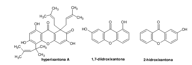 moleculasss